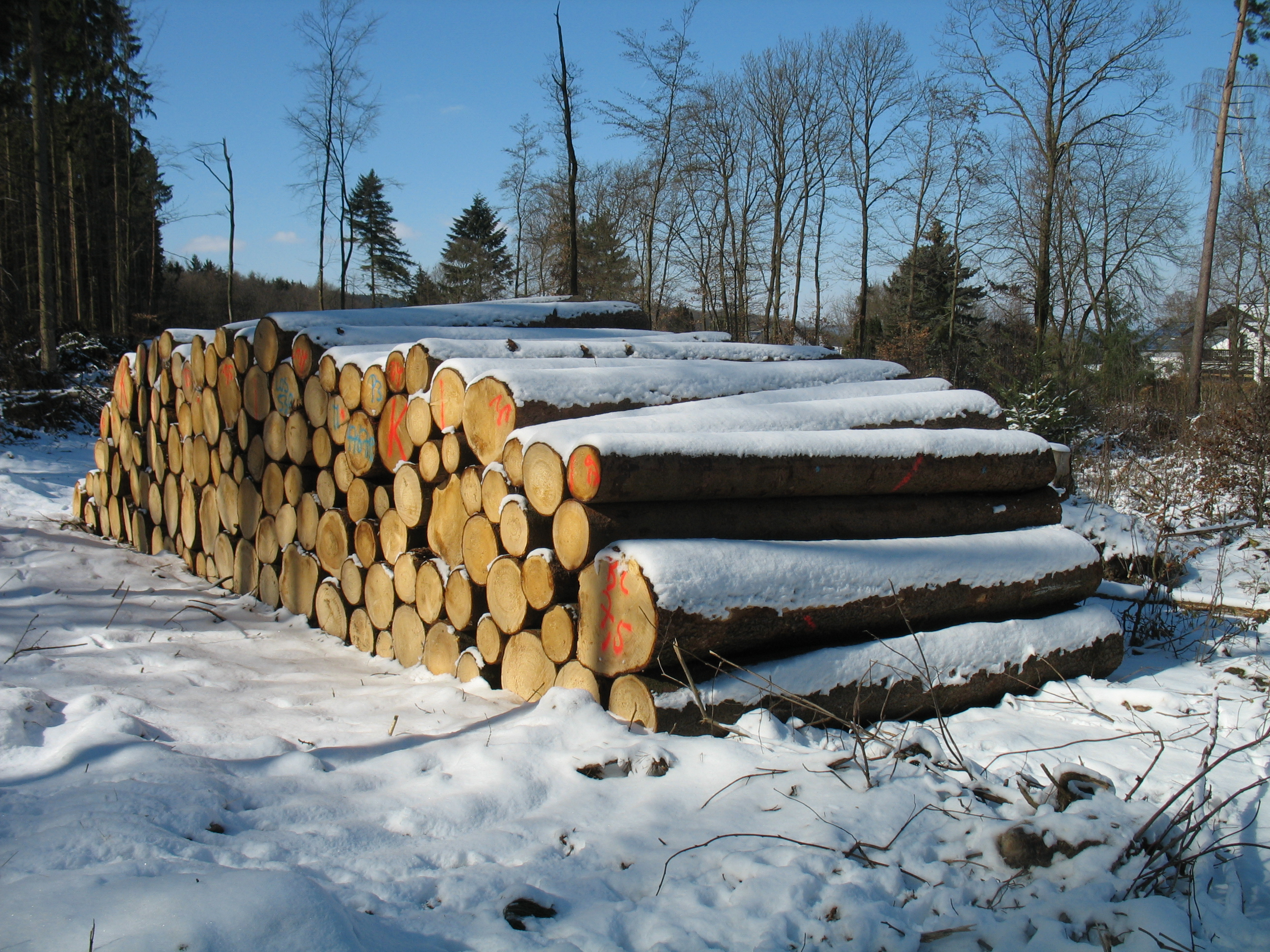 Holzstapel (Polter) an einer Sturmwüstung.